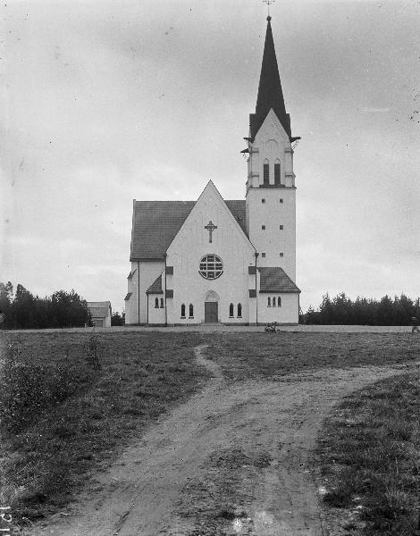 Kyrkan från söder. Snabbinv.